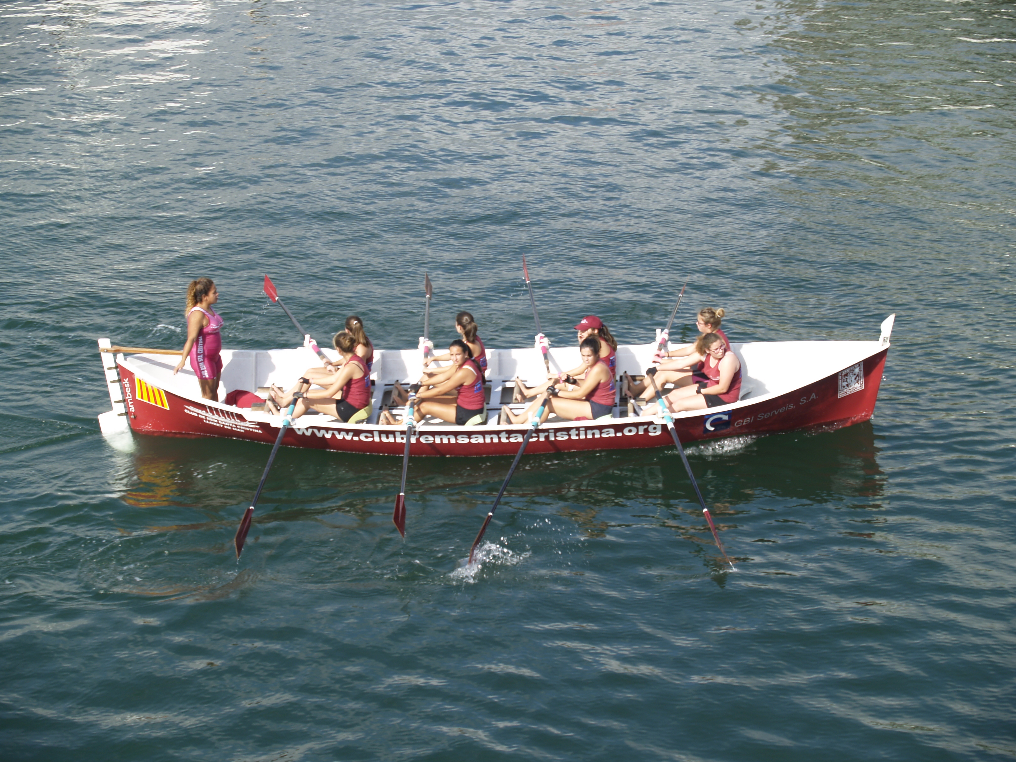 Campeonato de Cataluña de Llaut 2015 - Club de Rem Sta. Cristina